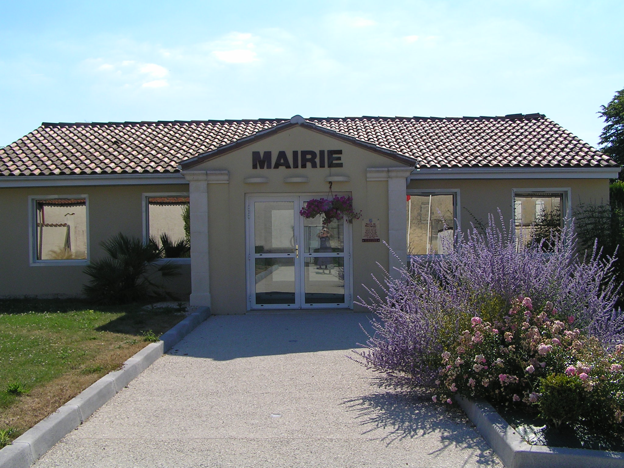 mairie de Mérignac